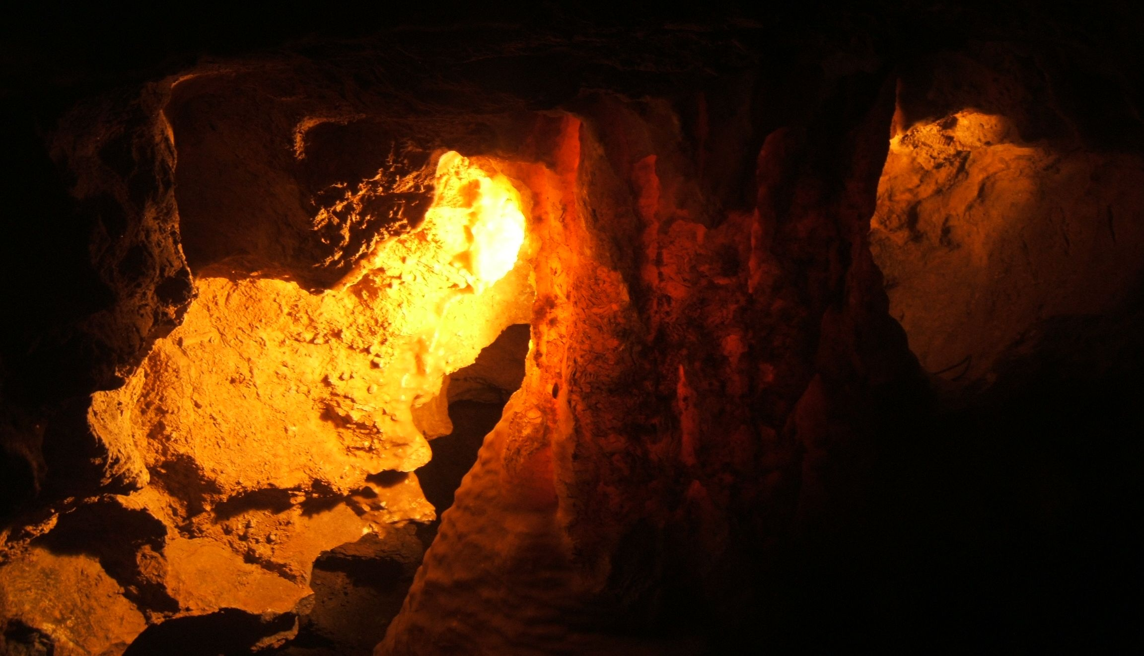 Wiehler Tropfsteinhöhle